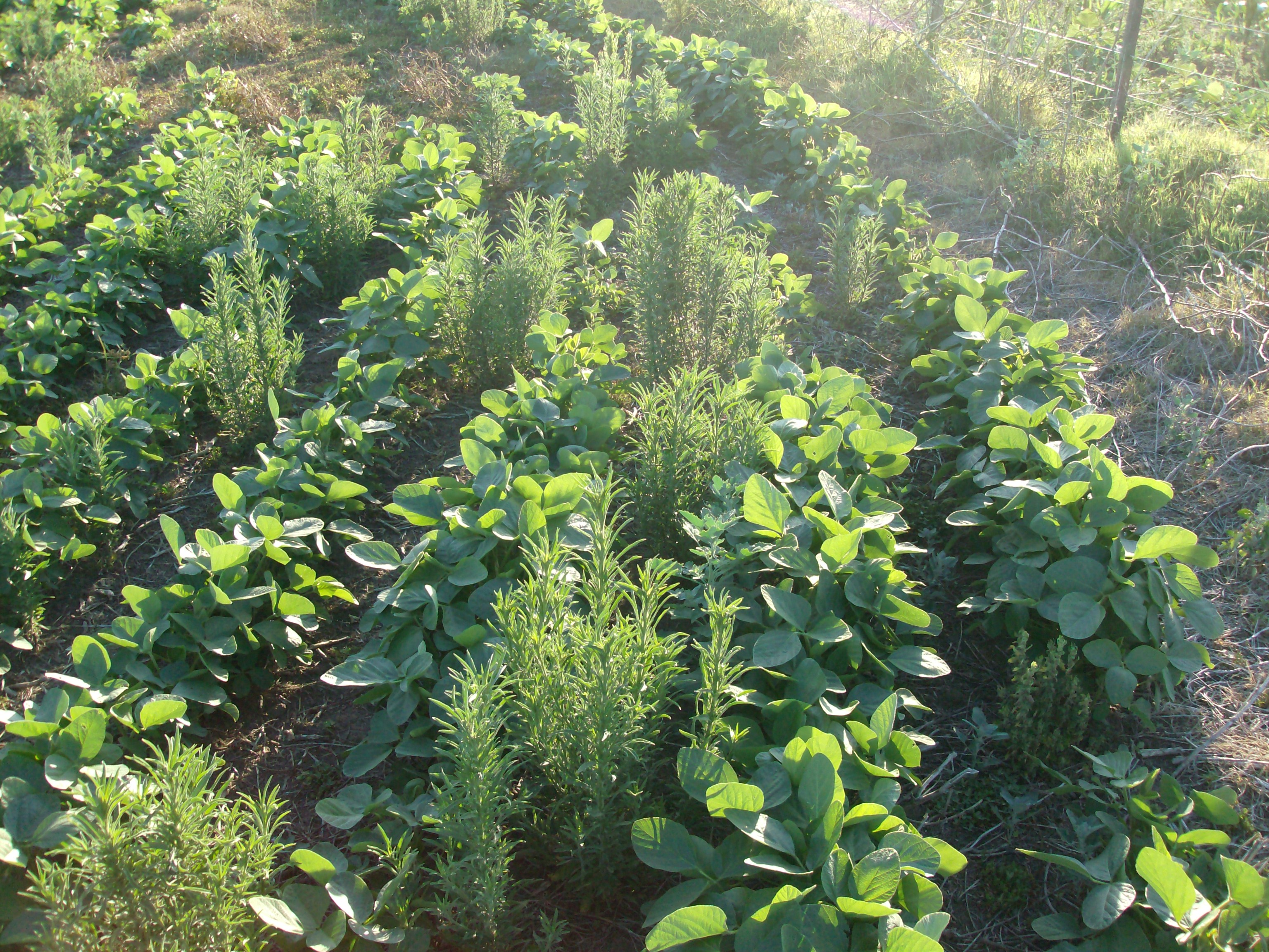 En la imágen se pueden ver plantas de la maleza Rama Negra en el surco de un cultivo de Soja. Se observa que la maleza esta en perfectas condiciones y no fue afectada por la aplicación del herbicida glifosato.